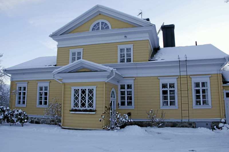 talvinen kuva Hintsan kartanosta